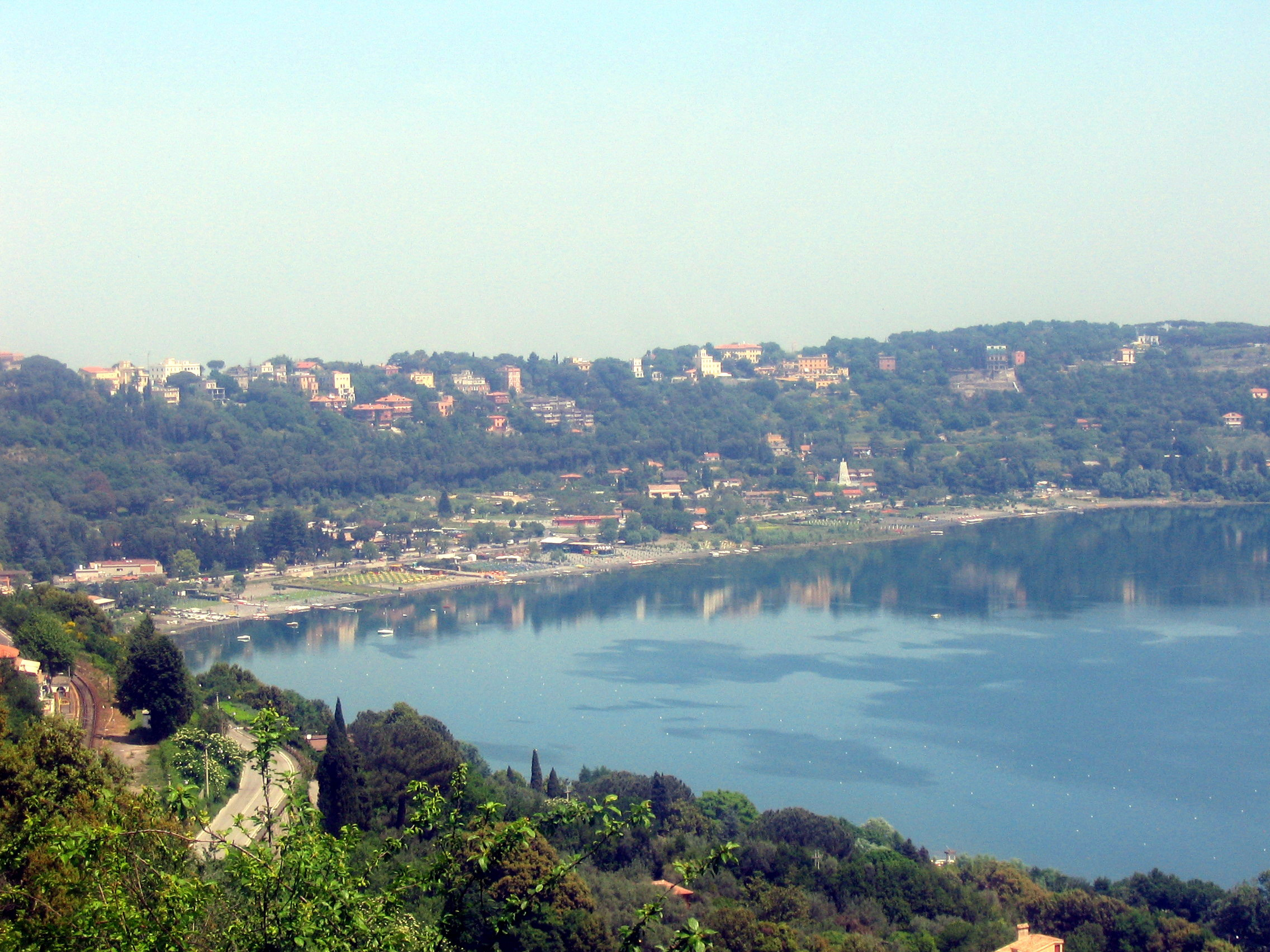 Castel Gandolfo e Lago di Albano, Lazio